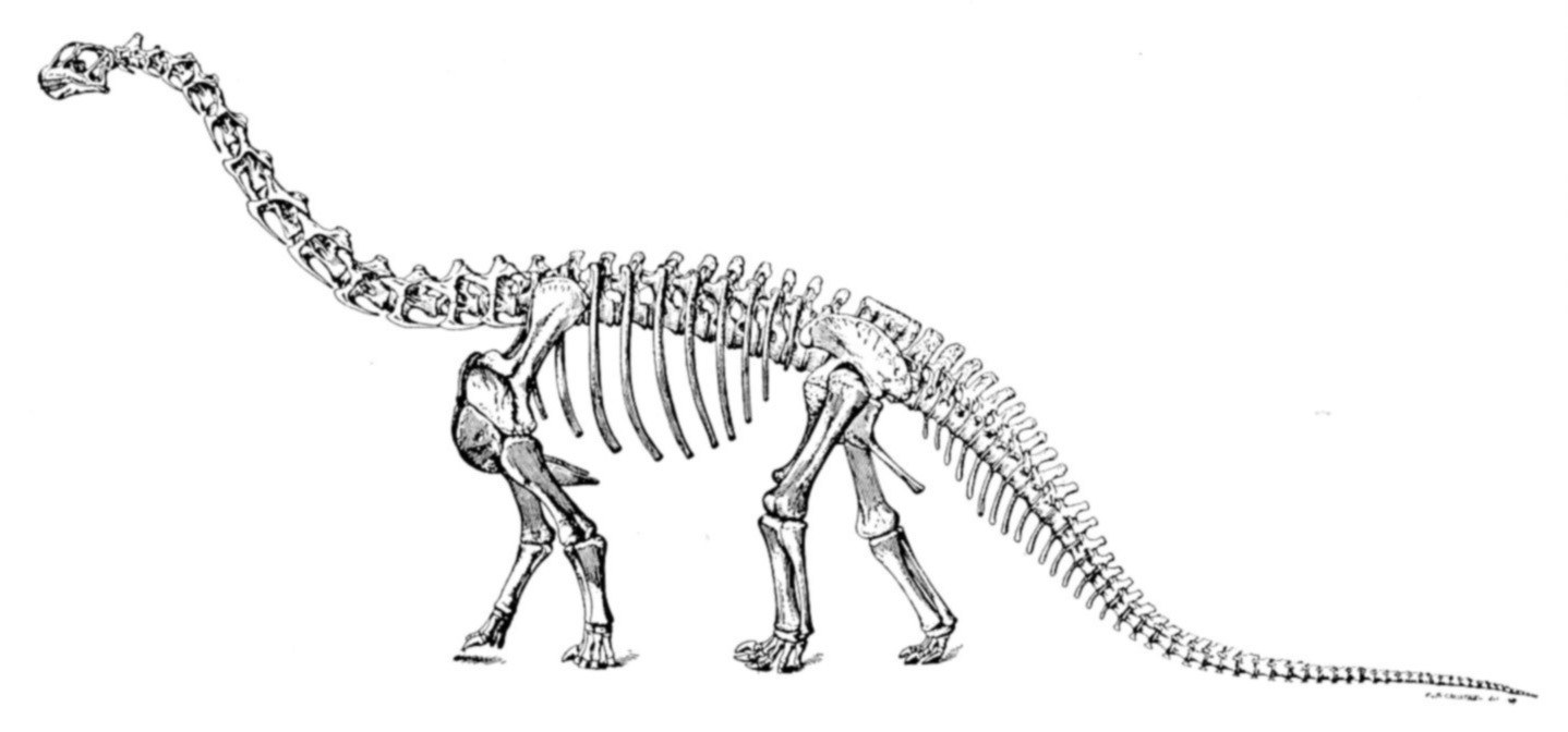 Pen drawing of a Camarasaurus supremus skeleton.